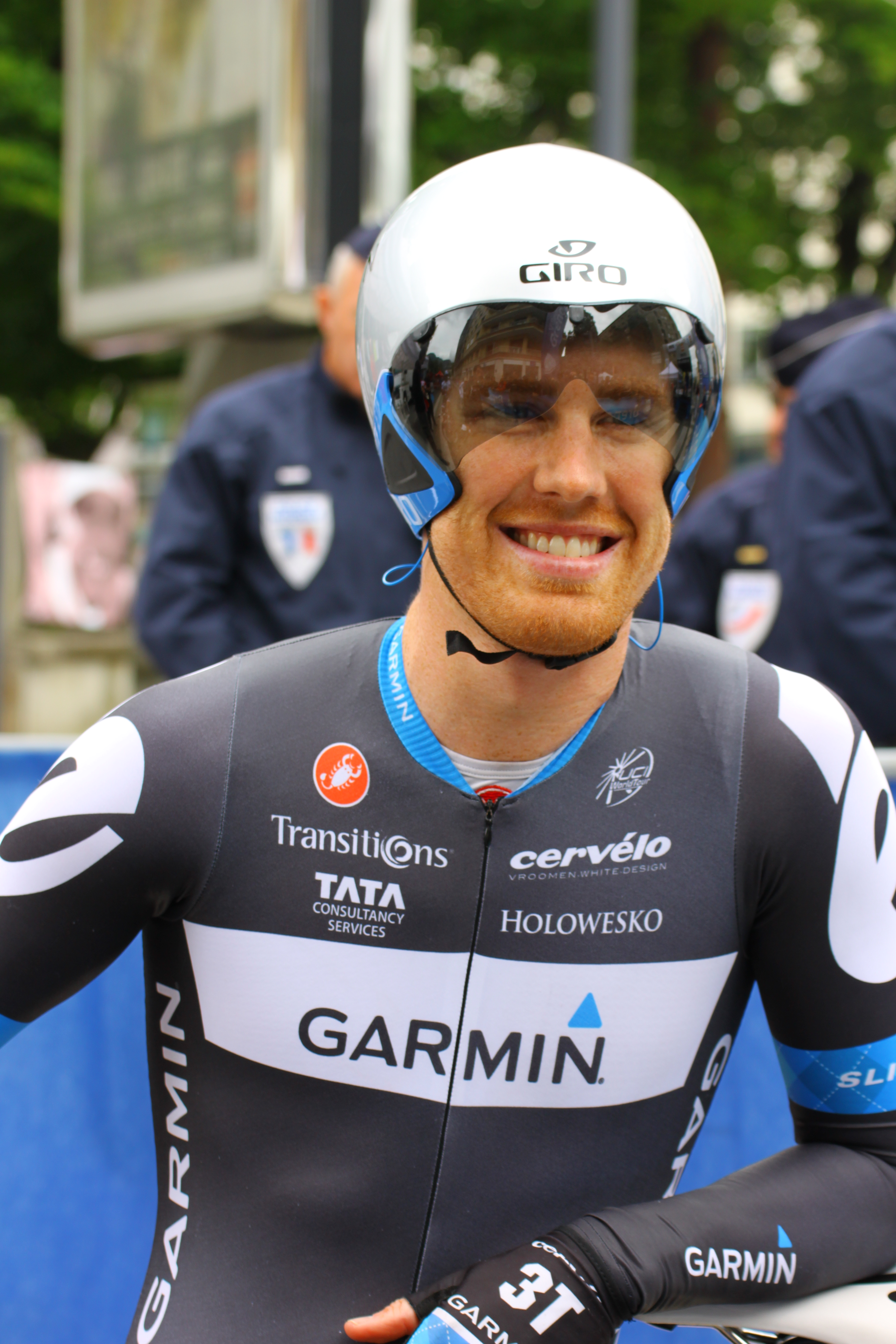 Tyler Farrar au départ du contre-la-montre du Critérium du Dauphiné 2011 à Grenoble